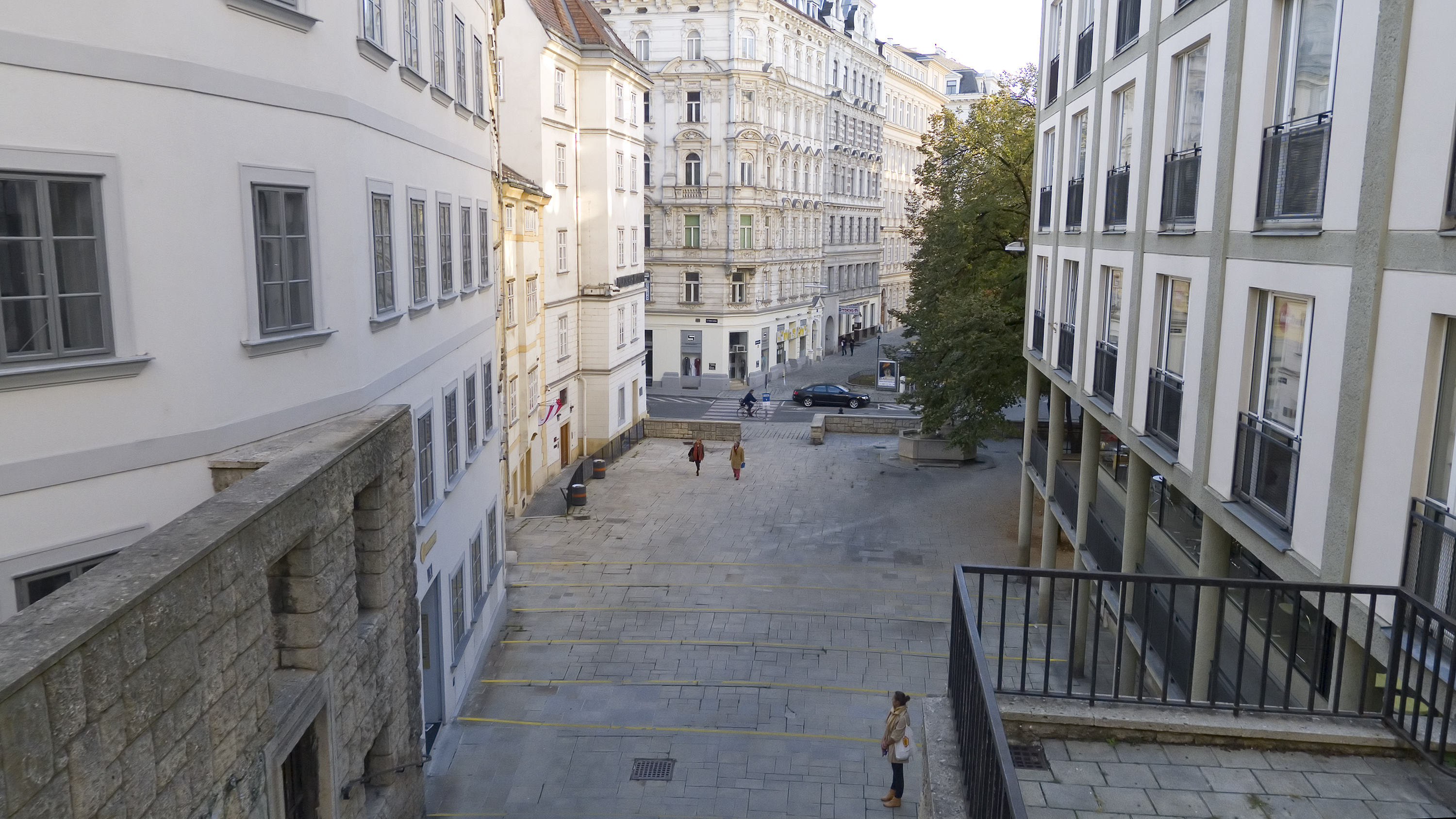 Am Gestade in Wien 1 bei Nr. 1 Richtung Nordwesten